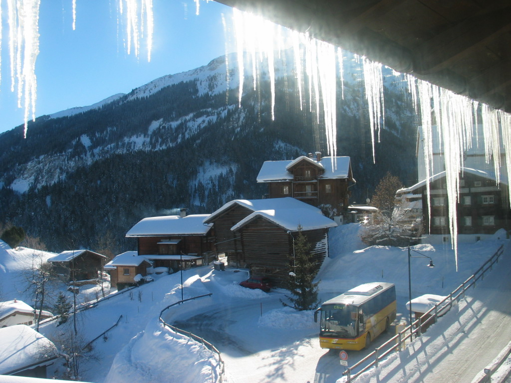 Tschiertschen Dorfzentrum im Winter